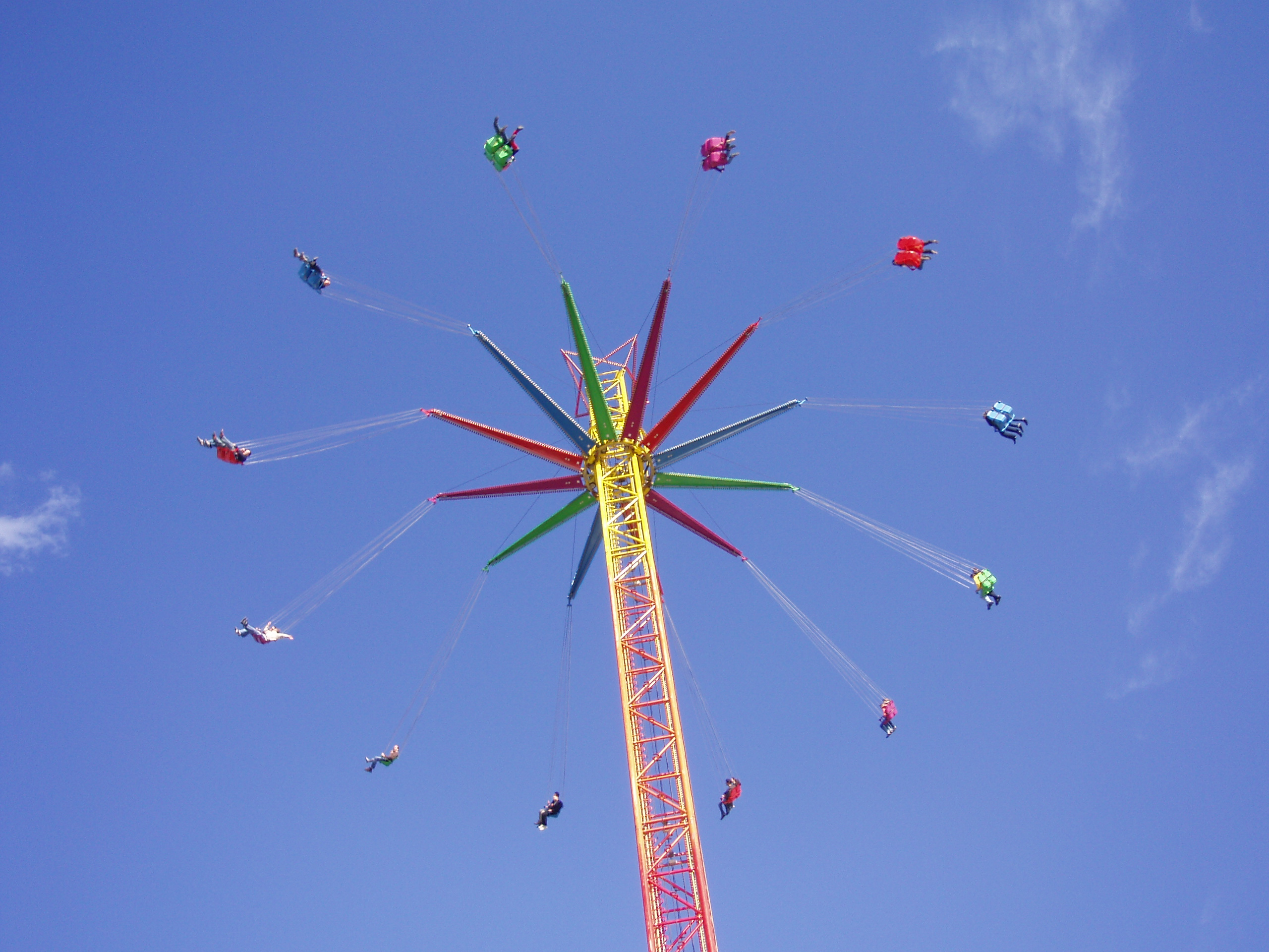 Star Flyer